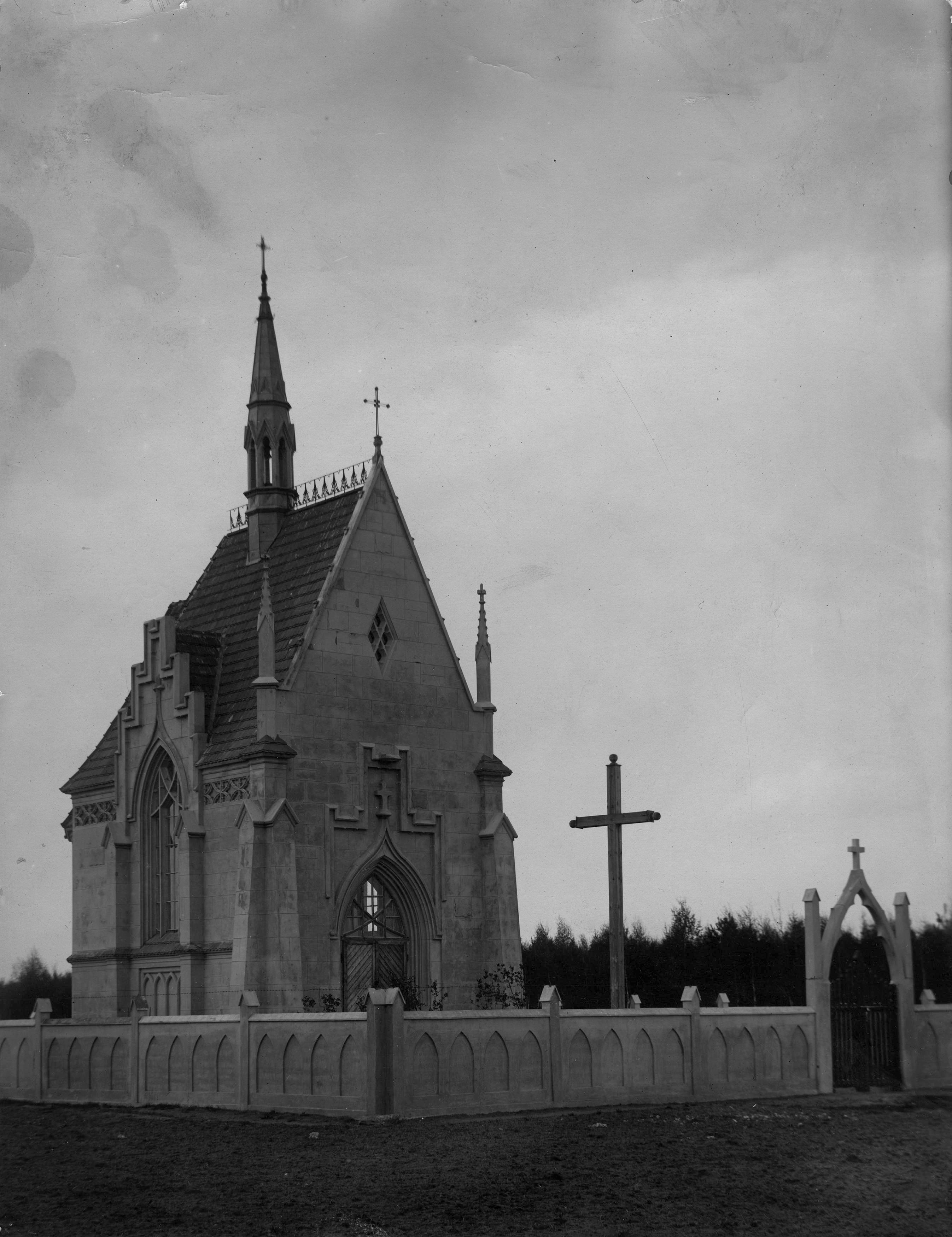 Беларуская (тарашкевіца): Грушаўка (Hrušaŭka), капліца-пахавальня Рэйтанаў (Rejtan)